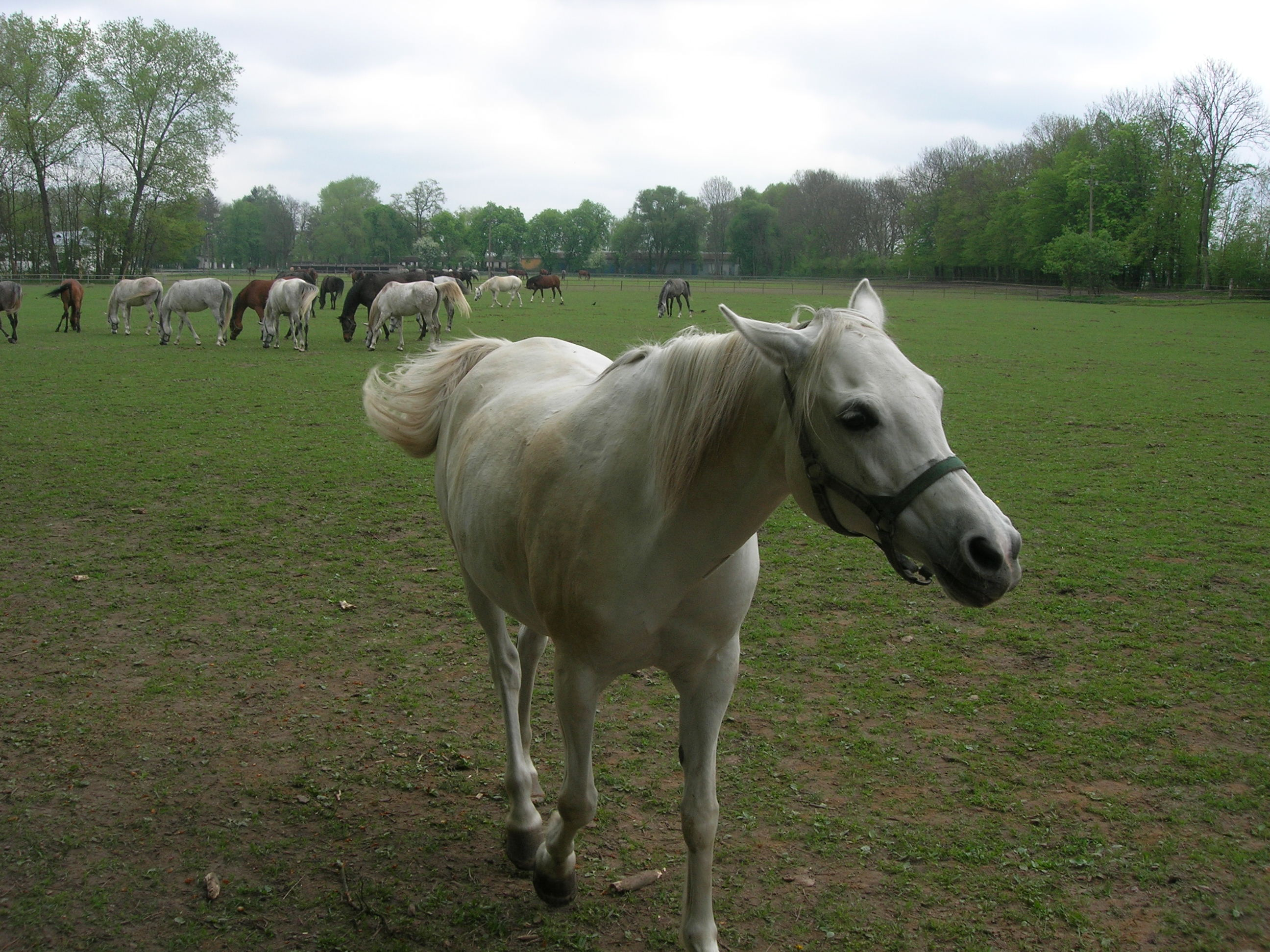 koń arabski